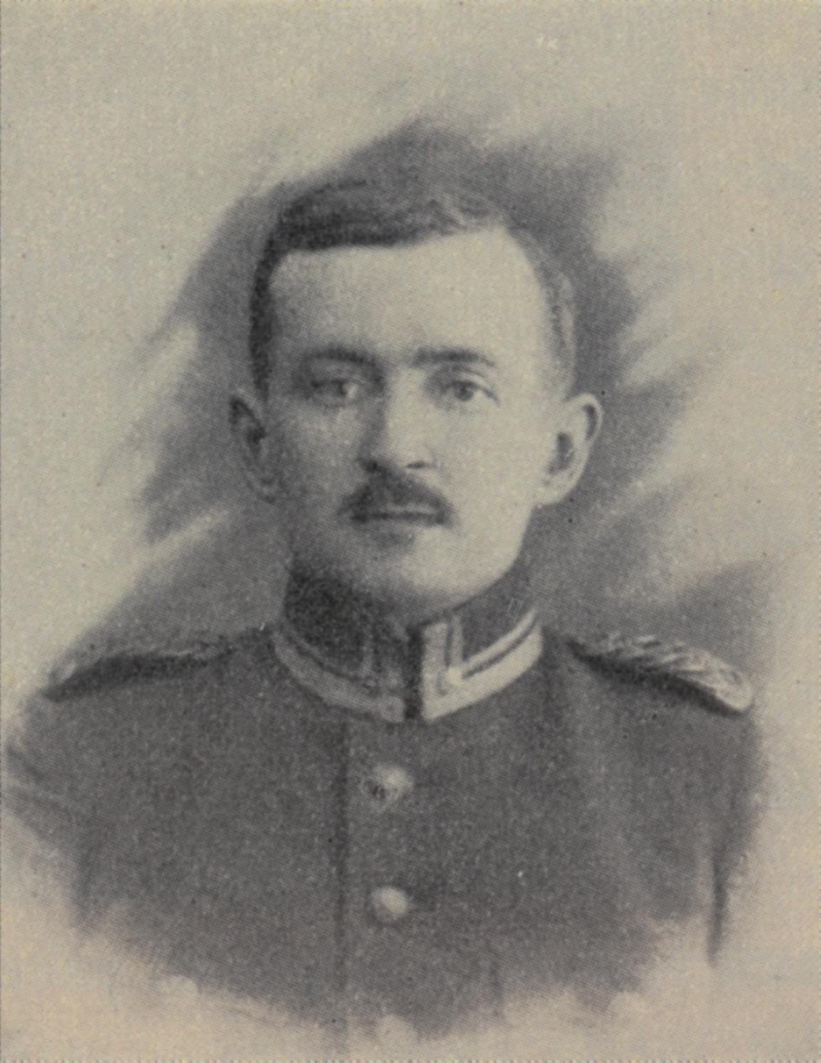 Description